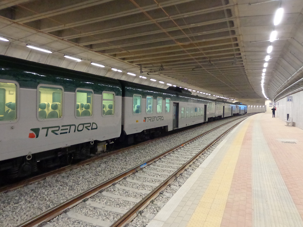 Stazione ferroviaria di Saronno Sud, primi transiti della linea S9 dai binari sotterranei.